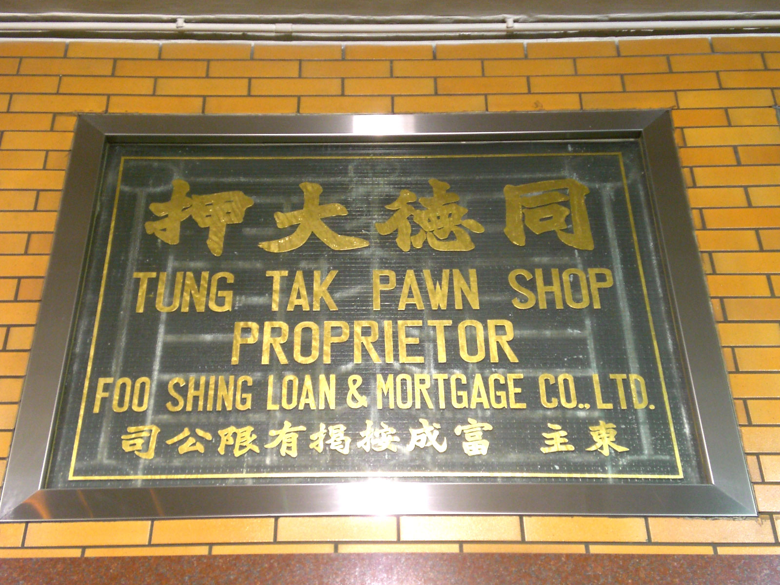 灣仔典當業